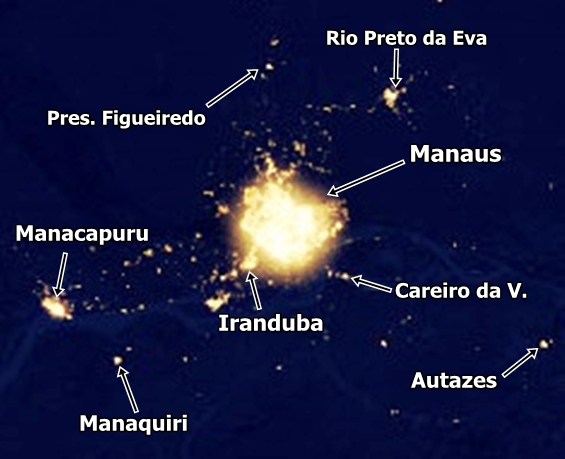 Imagem de satélite das luzes noturnas de cidades próximas à Manaus.